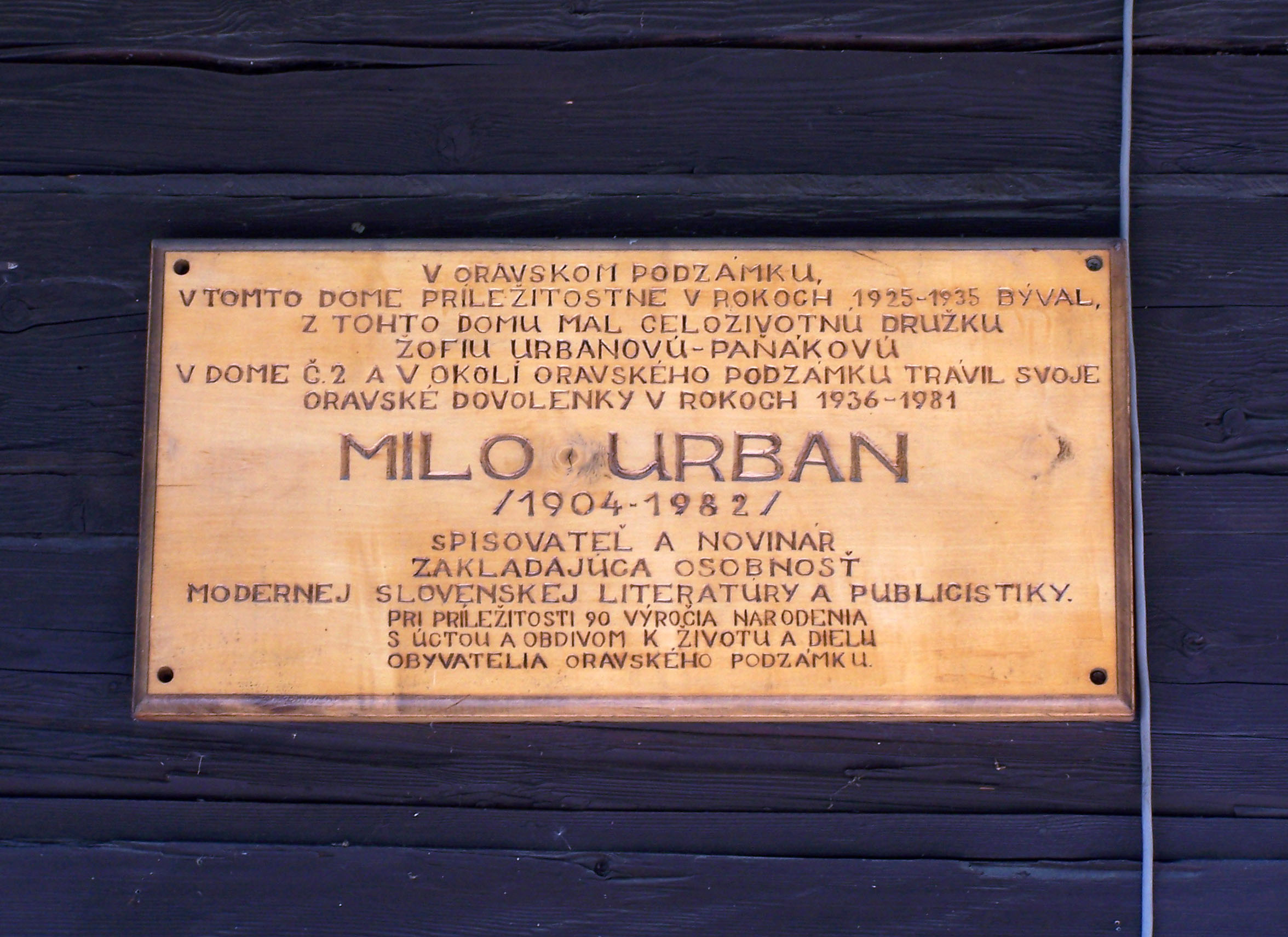 Memorial plaque to writer Milo Urban in Oravský Podzámok, Slovakia